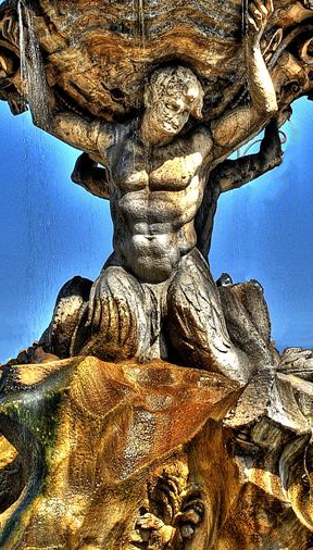 Fontana alla Bocca della Verità